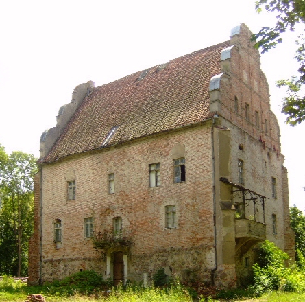 Pozostałości zamku w Giżycku